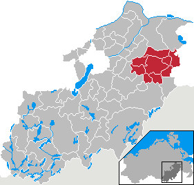 Amt Groß Miltzow in Mecklenburg-Vorpommern - District Mecklenburg-Strelitz (1992-1999)